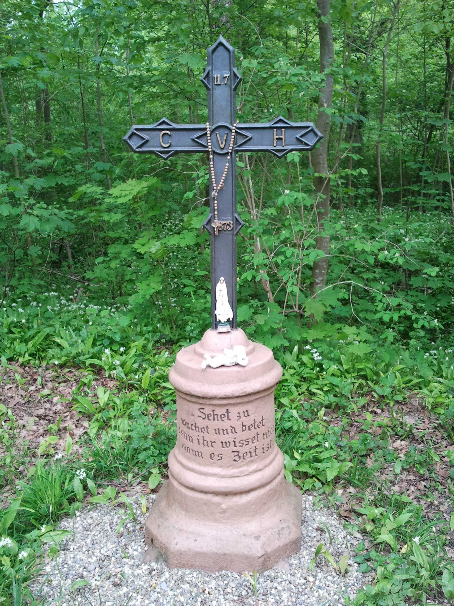 Baroner Kritzli aus Wyhl am Kaiserstuhl